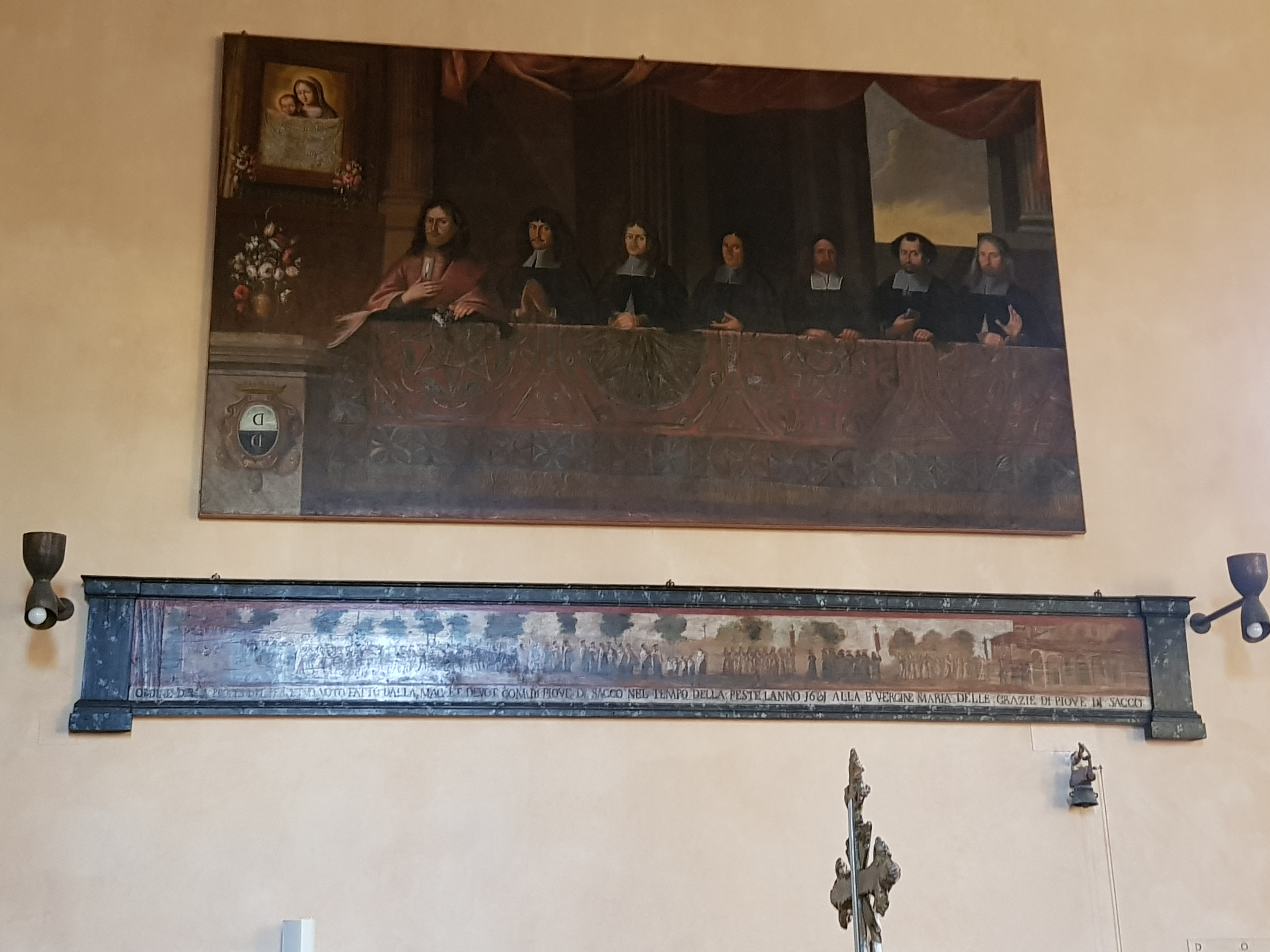 quadro che mostra sopra il consiglio comunale che ha deciso per il voto sotto la processione